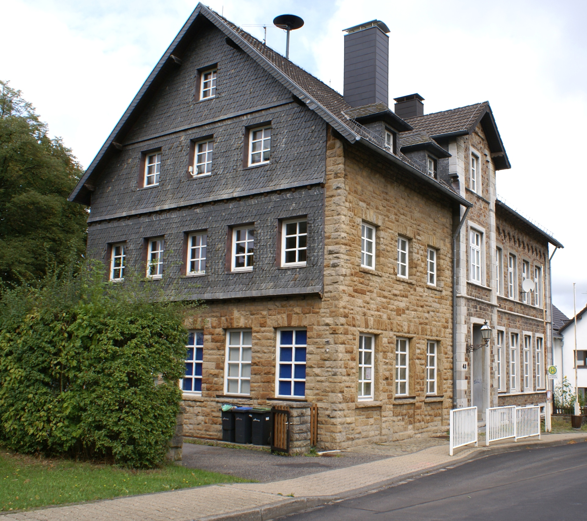 Roetgen-Rott Quirinisstrasse 43This is a photograph of an architectural monument., no. 52